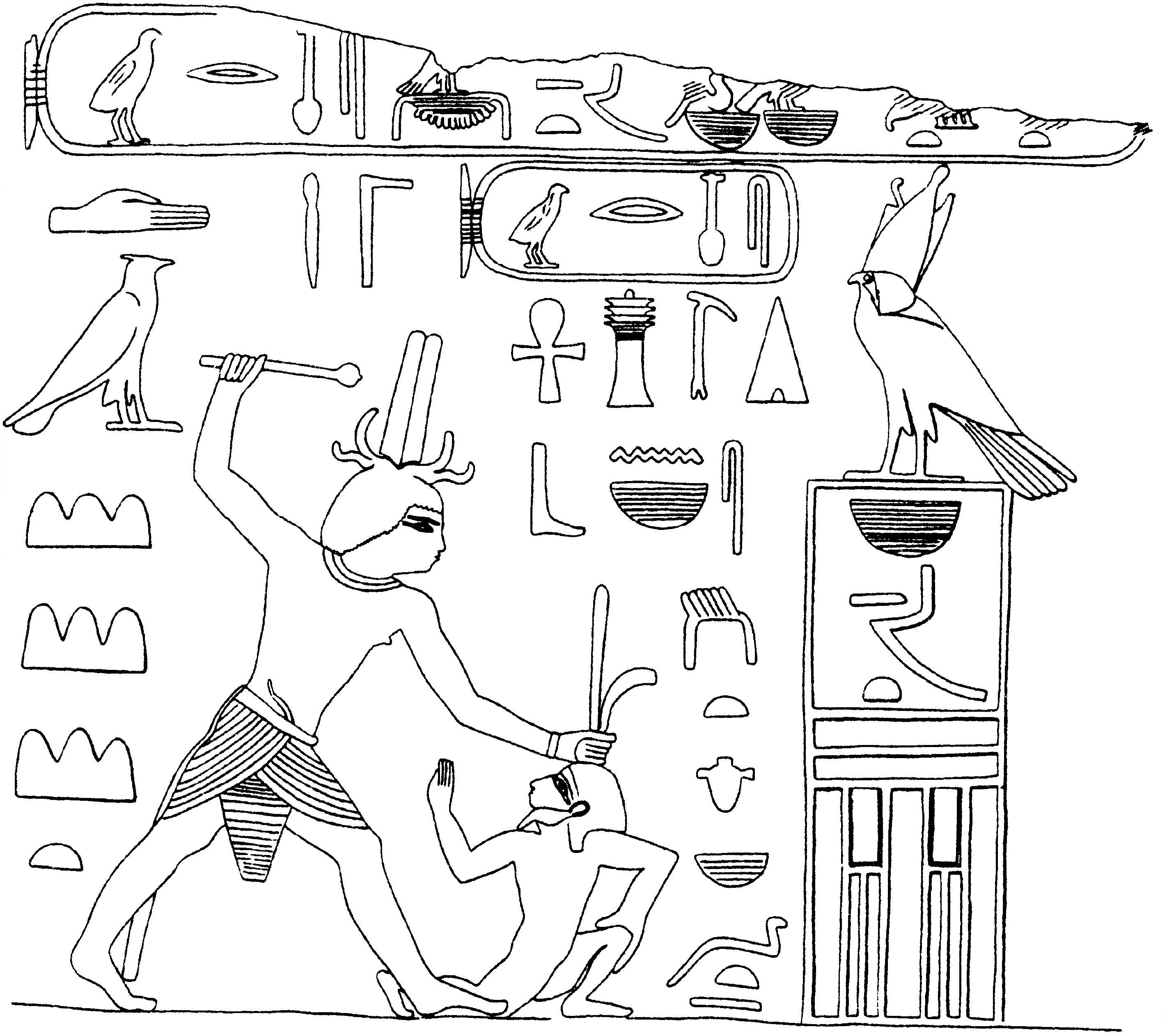 Panovník Snofru poráží beduíny; reliéf ze Sínaje